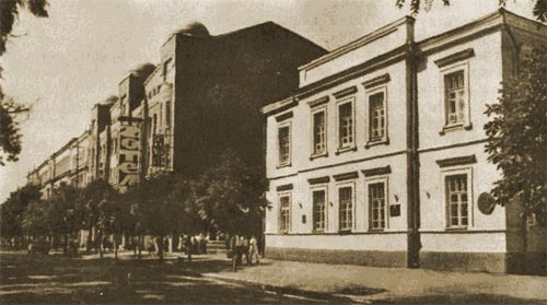 Памятник истории и культуры - бывший дом Инзова. Начало XIX в.